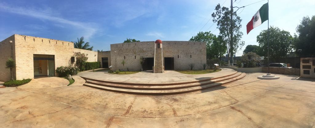 Foto panorámica del Museo Fuerte Casa Mata.